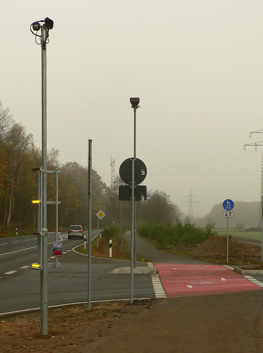 Bike-Flash mit Wärmesensor in Garbsen, Burgstraße, Verkehrssituation mit Fahradweg